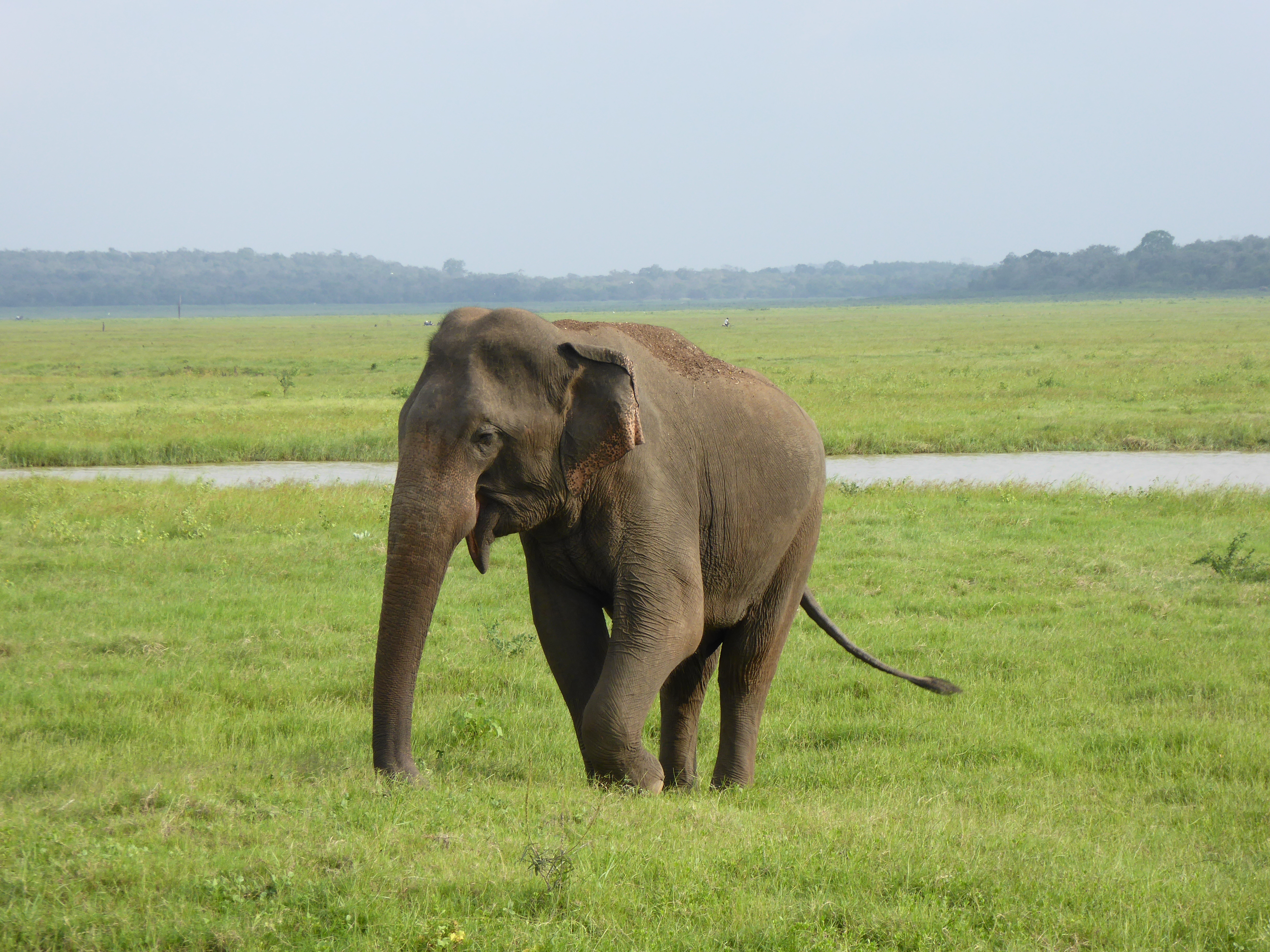 Éléphant sri-lankais.